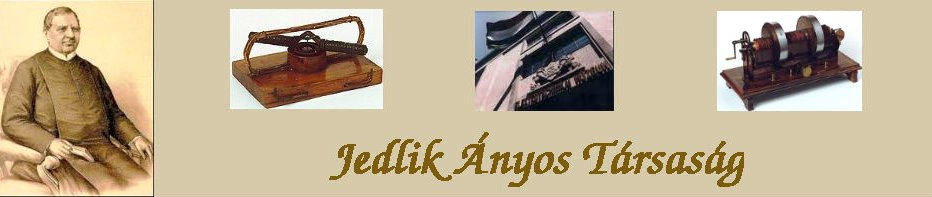 A budapesti Jedlik Ányos Társaság honlapjának logója